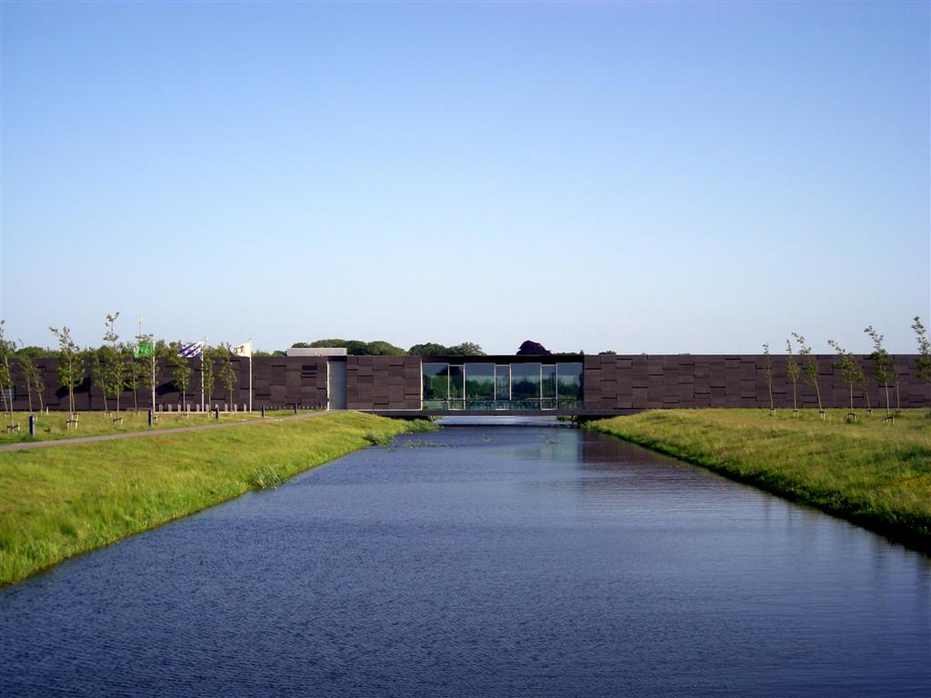 Museum Belvedere bij Heerenveen.